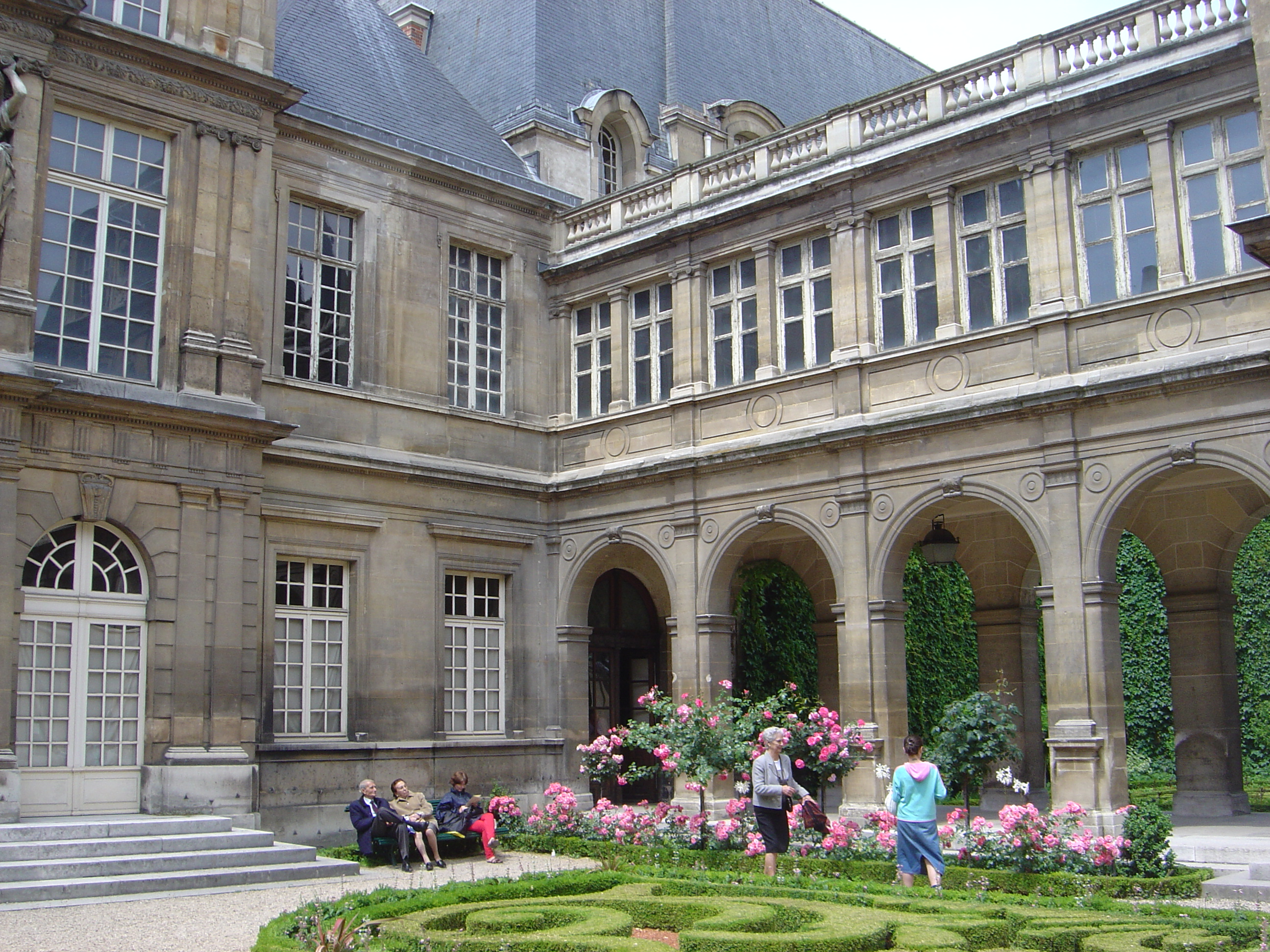 . Musée Carnavalet, courtyard